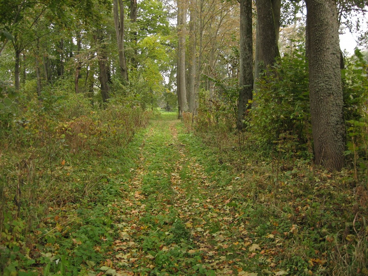 Уселюб. Уселюбскі парк. Заходняя алея ў пейзажнай частцы парку